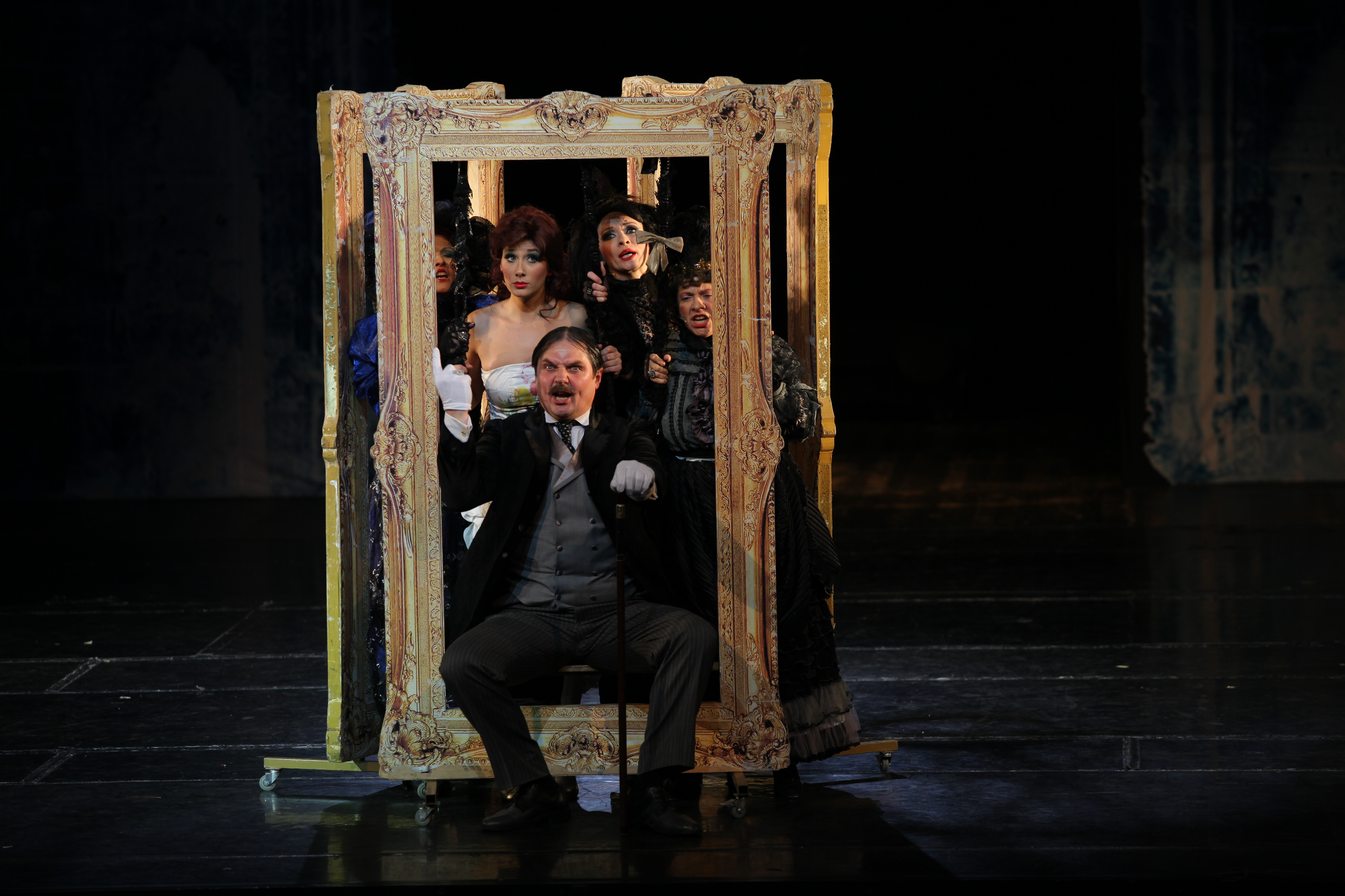 Premijera predstave "Zona Zamfirova"